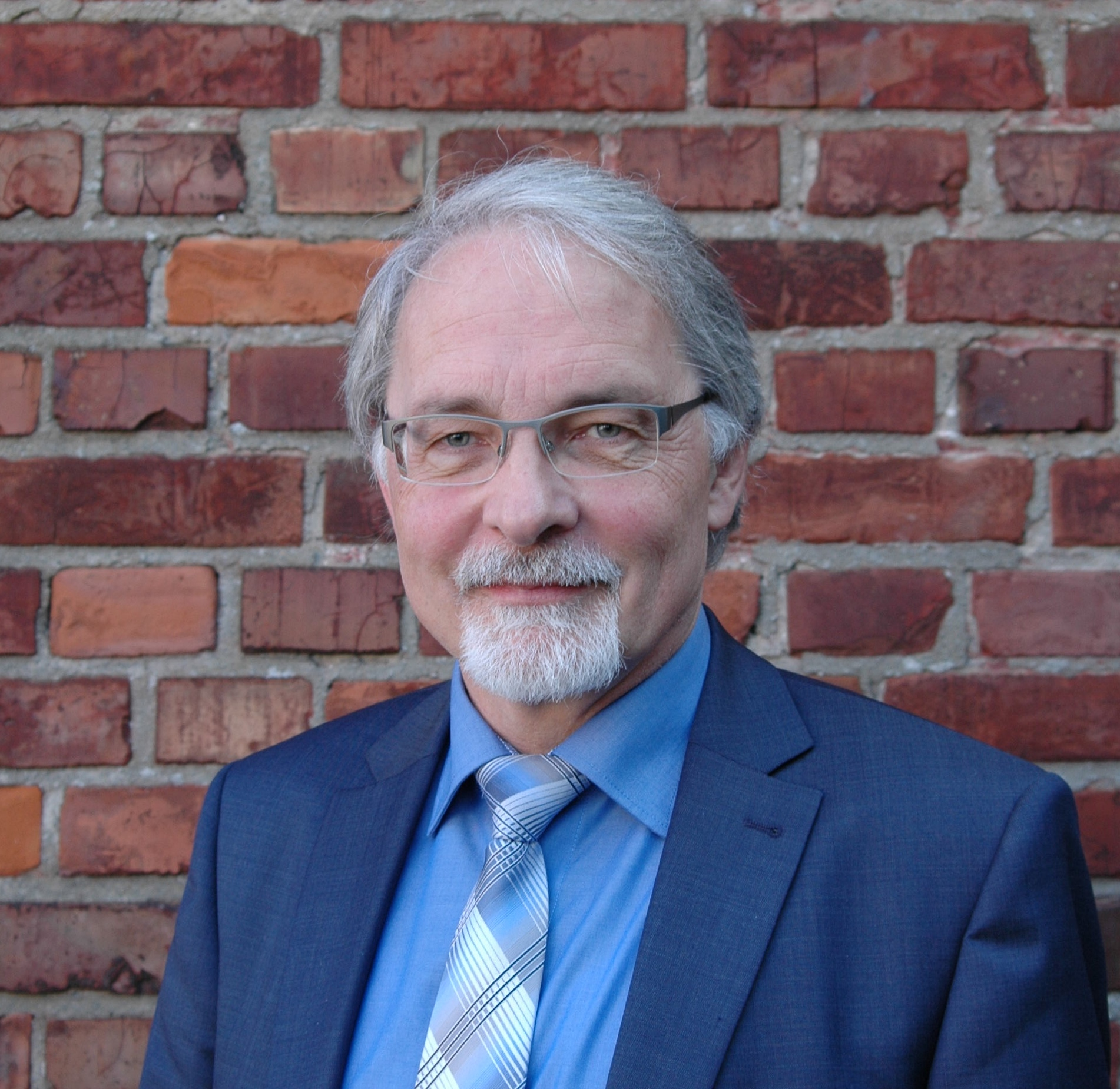 Jubiläumsfeier „20 Jahre Streuobstwiesen Aufpreis Projekt“ bei der Obstkelterei van Nahmen